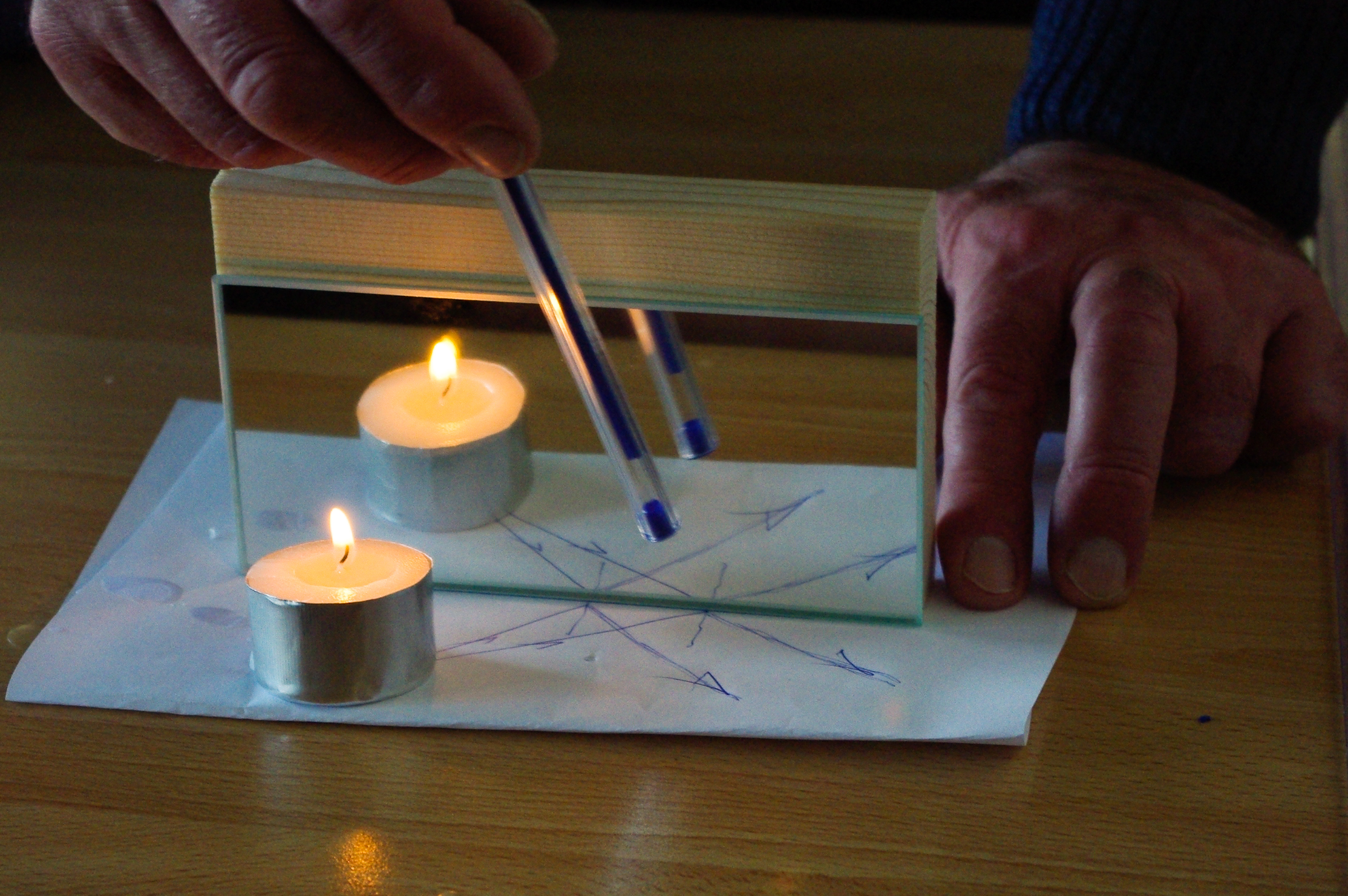 Peegeldumisseaduse piltlik näide